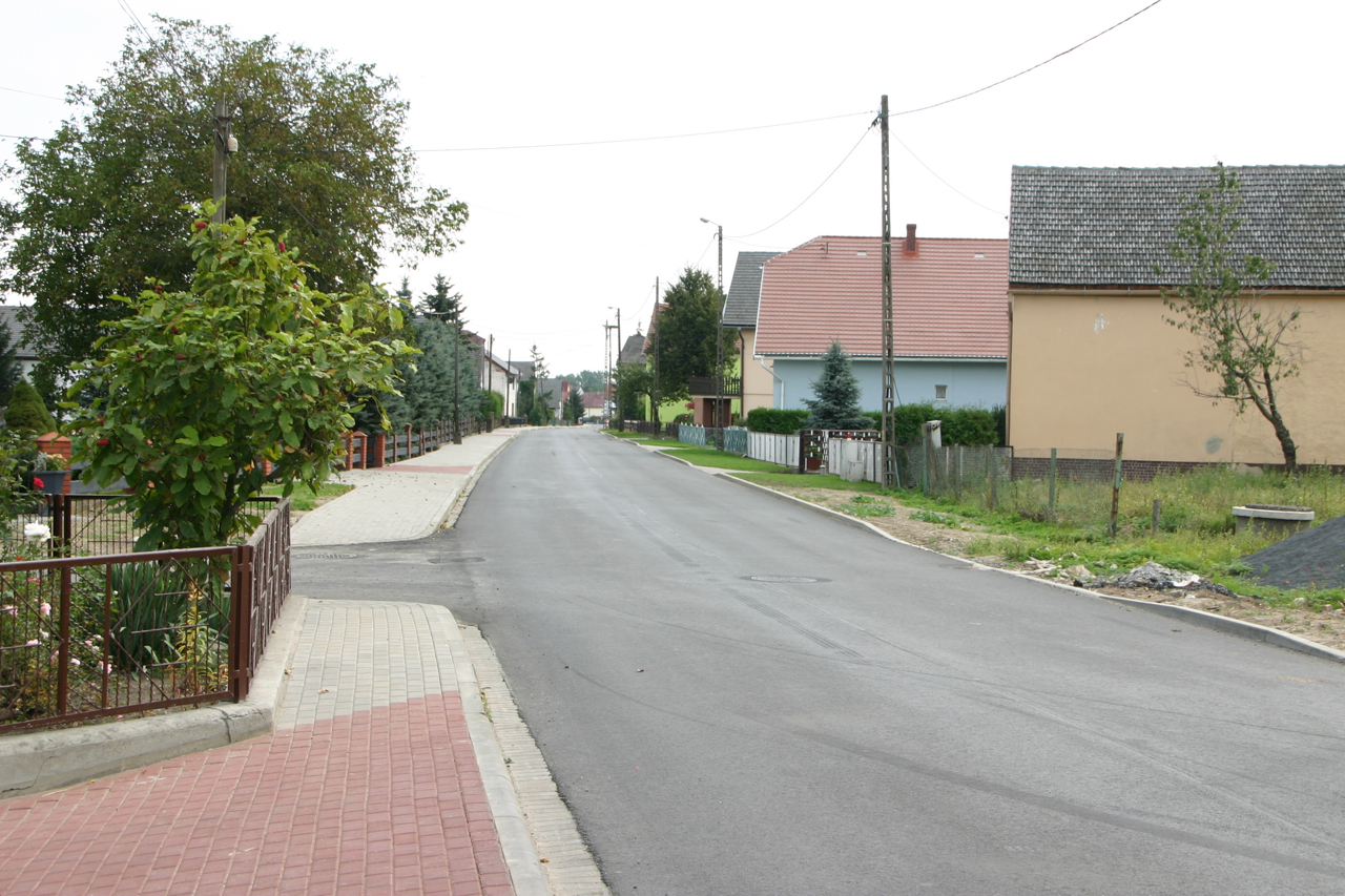 Mochów (dodatkowa nazwa w j. niem. Mochau) – wieś w Polsce położona w województwie opolskim, w powiecie prudnickim, w gminie Głogówek.